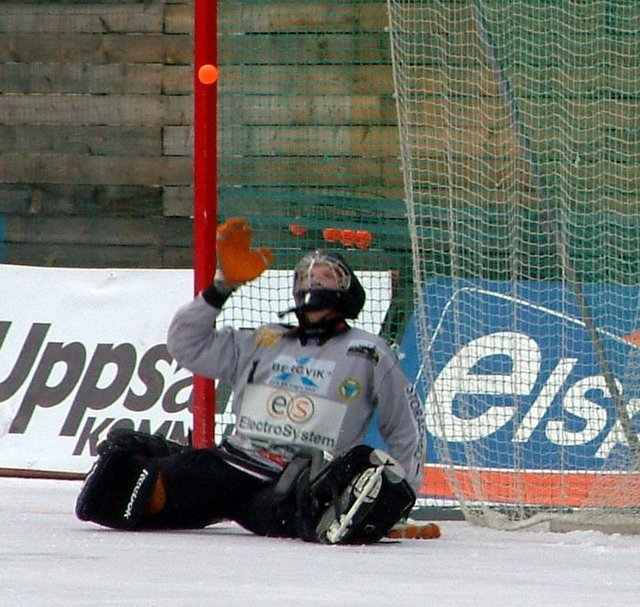 Bandykeeper Pasi Heikkanen during Bandy world cup 2005